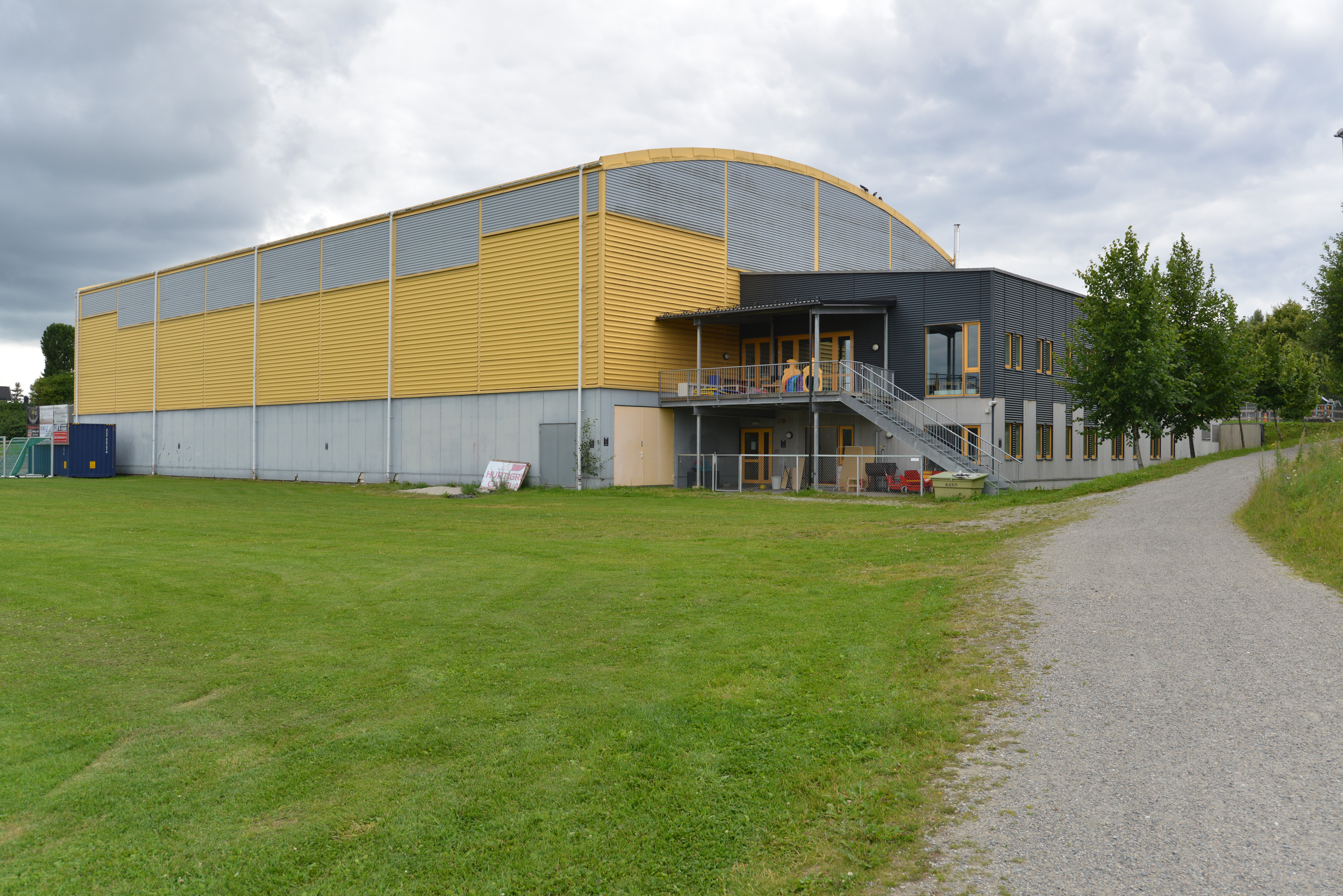 Kløftahallen på Kløfta i Ullensaker